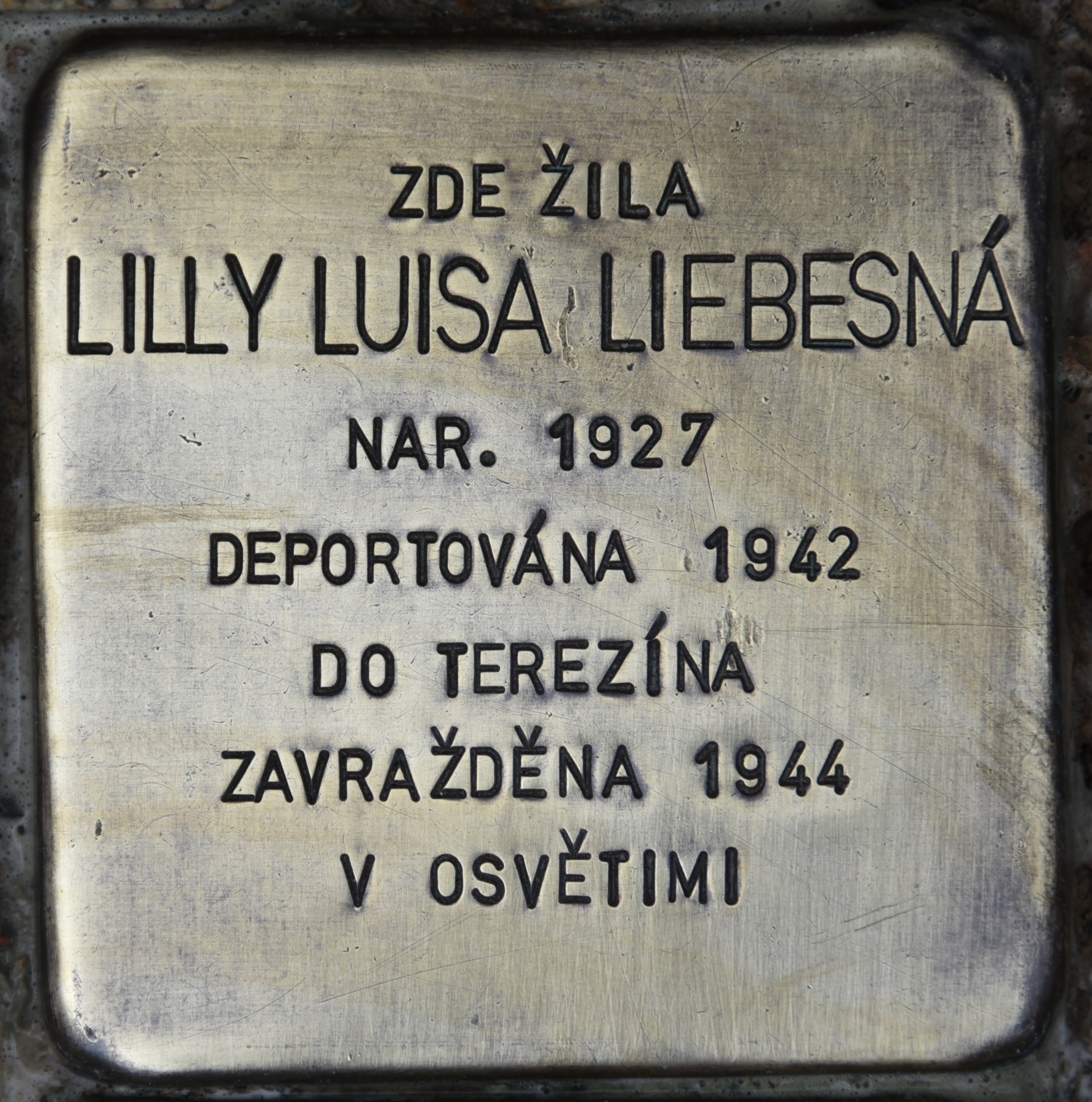 Stolperstein für Lilly Luisa Liebesna